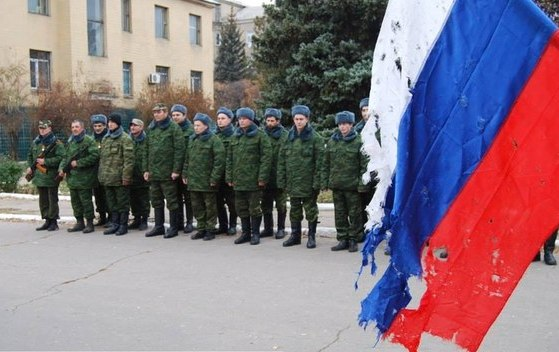 Незаконні військові формування на площі Леніна в м. Торезі